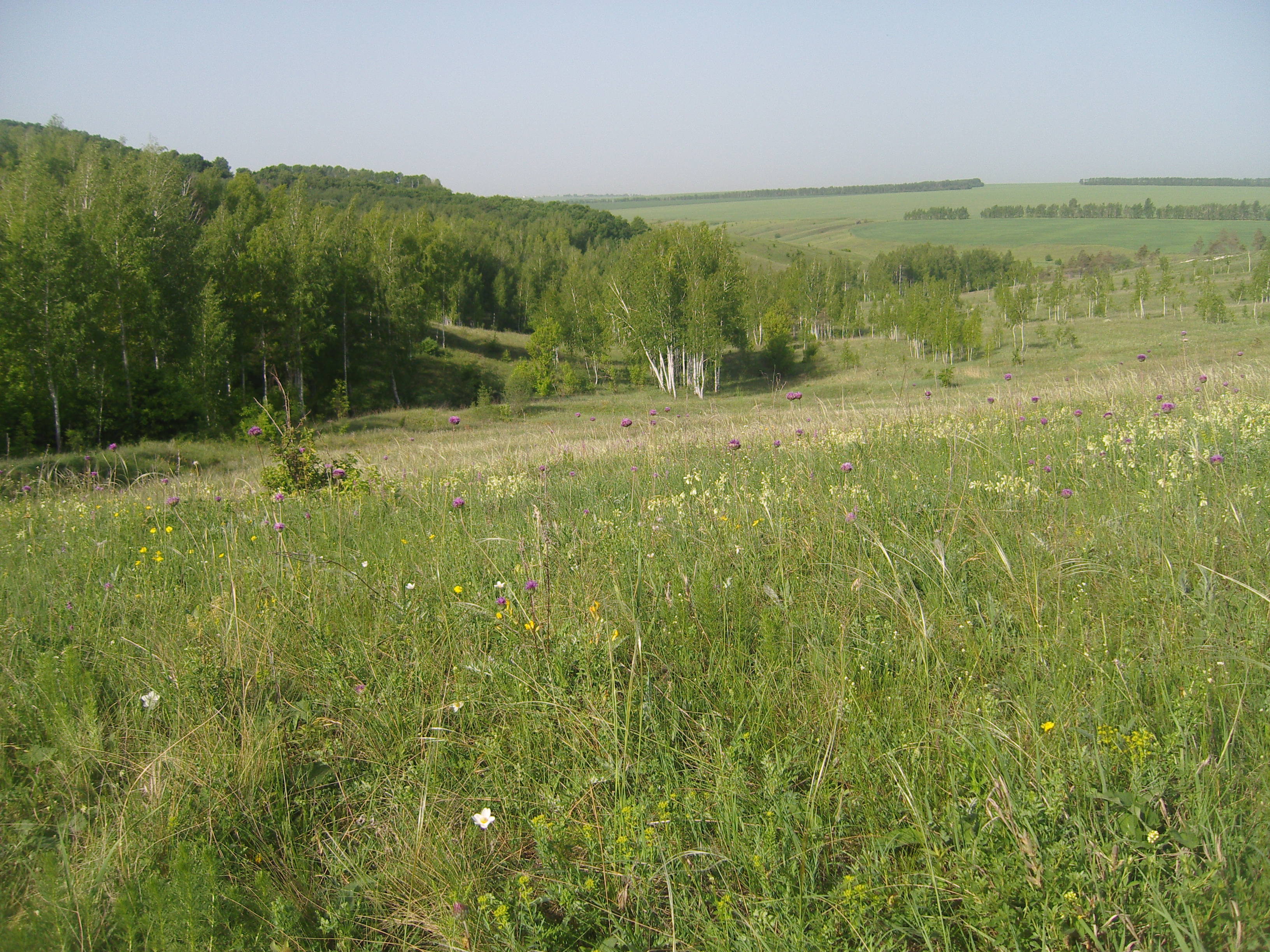 «Лысые горы», участок заповедника «Белогорье». Белгородская область.